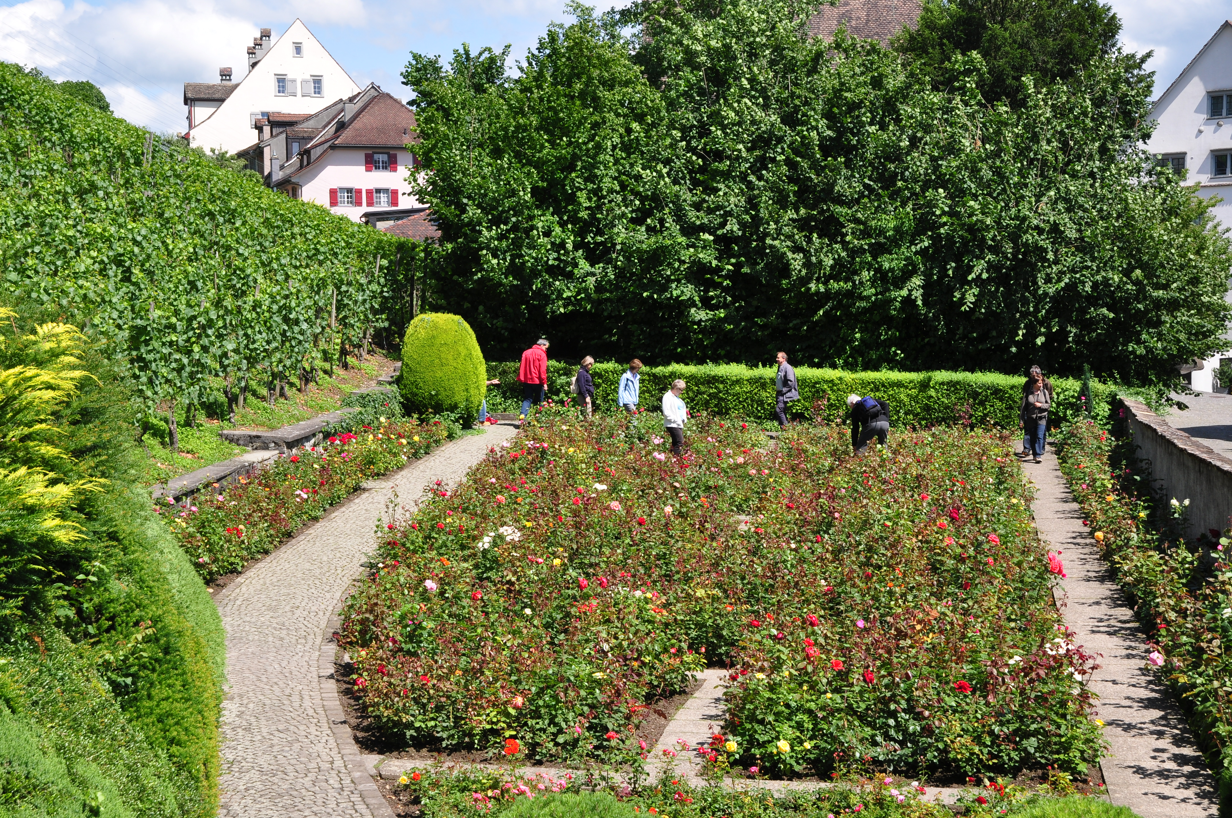 Rosengarten in Rapperswil (Switzerland)